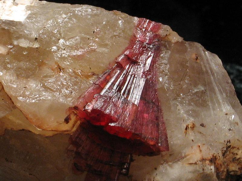 turmalin rubelit i kwarc, pochodzenie Madagaskar, autor zdjęcia Stowarzyszenie Spirifer